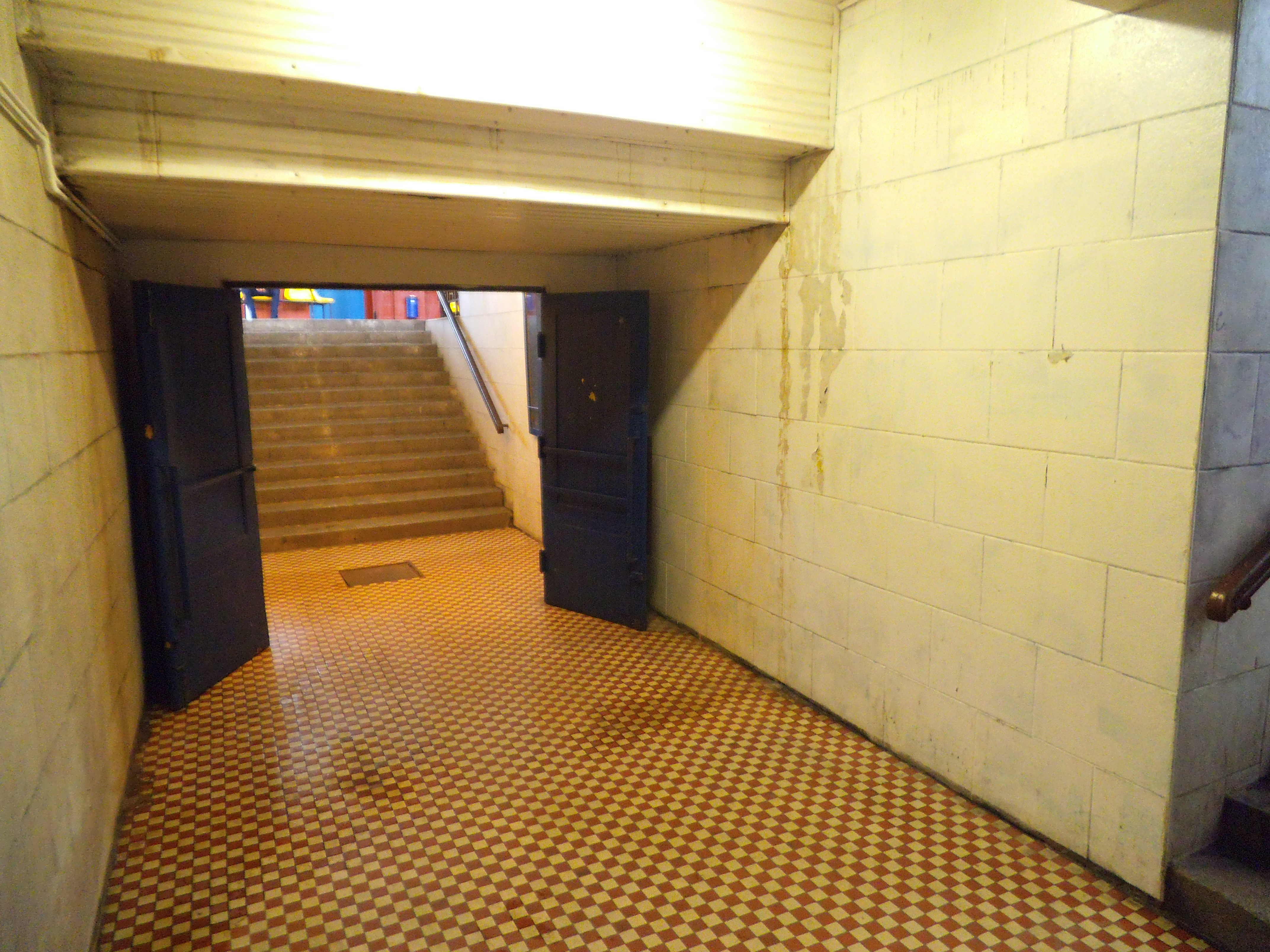 Toruń Miasto28